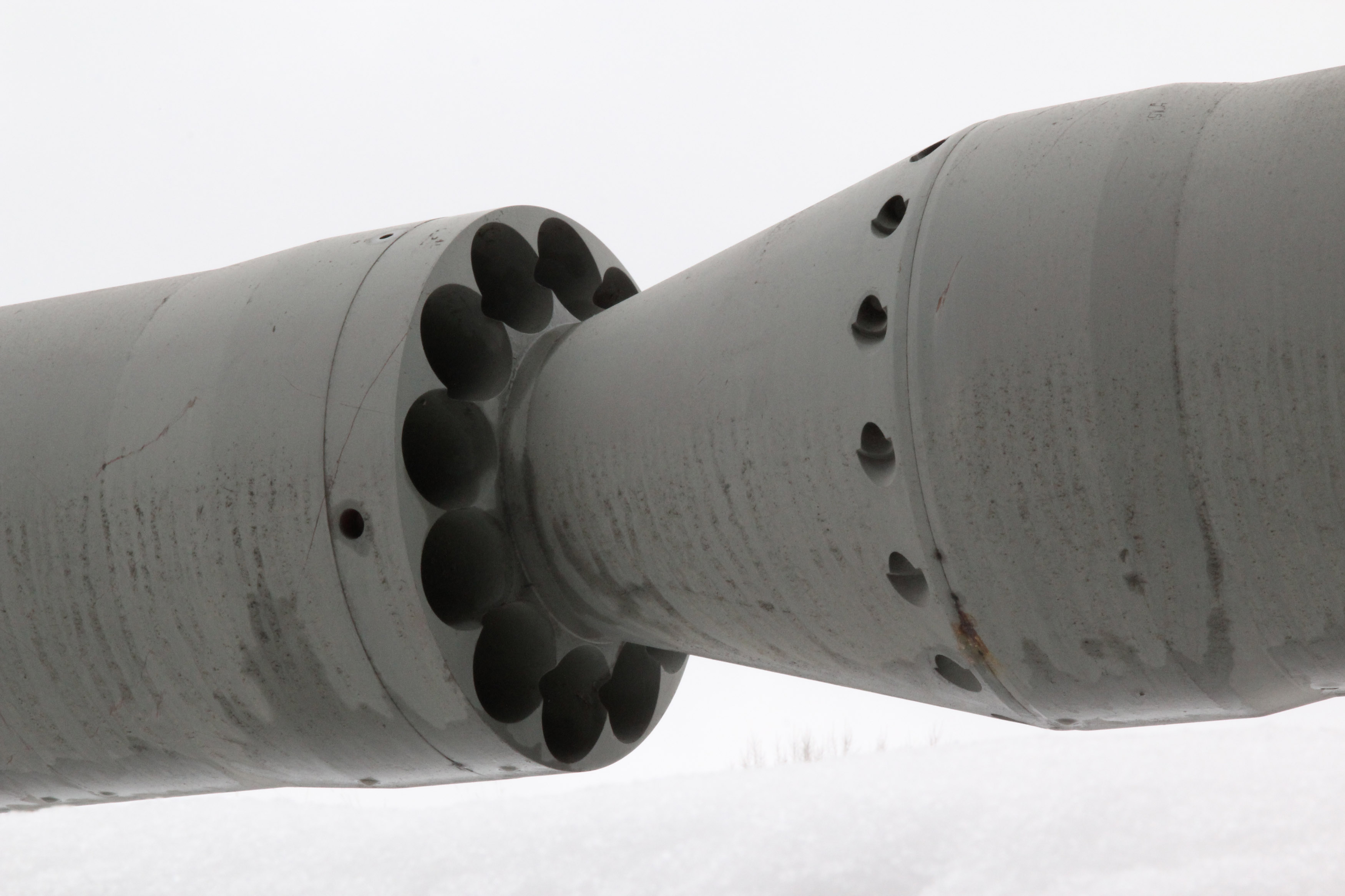 Szczegół silnika rakiet 3R9 i 3R10